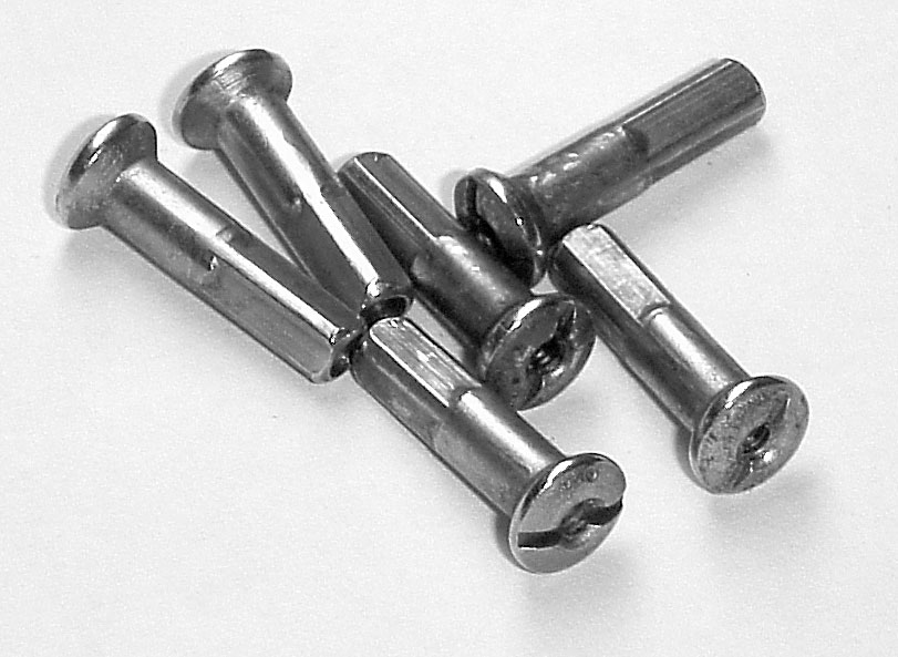 Speichennippel